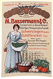 Historisches Bildmaterial aus dem Archiv von Sonnen Bassermann